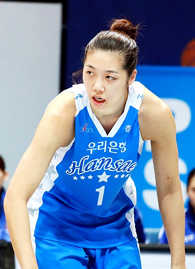 160101 여자농구 신한은행 vs 우리은행 직찍 2